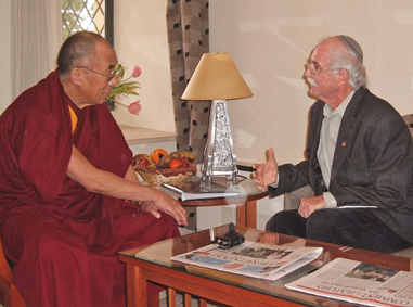 ד"ר חיים פרי בפגישה עם הדלאי-לאמה לקראת ייסוד פרוייקט משותף לבני נוער ישראליים וטיבטים